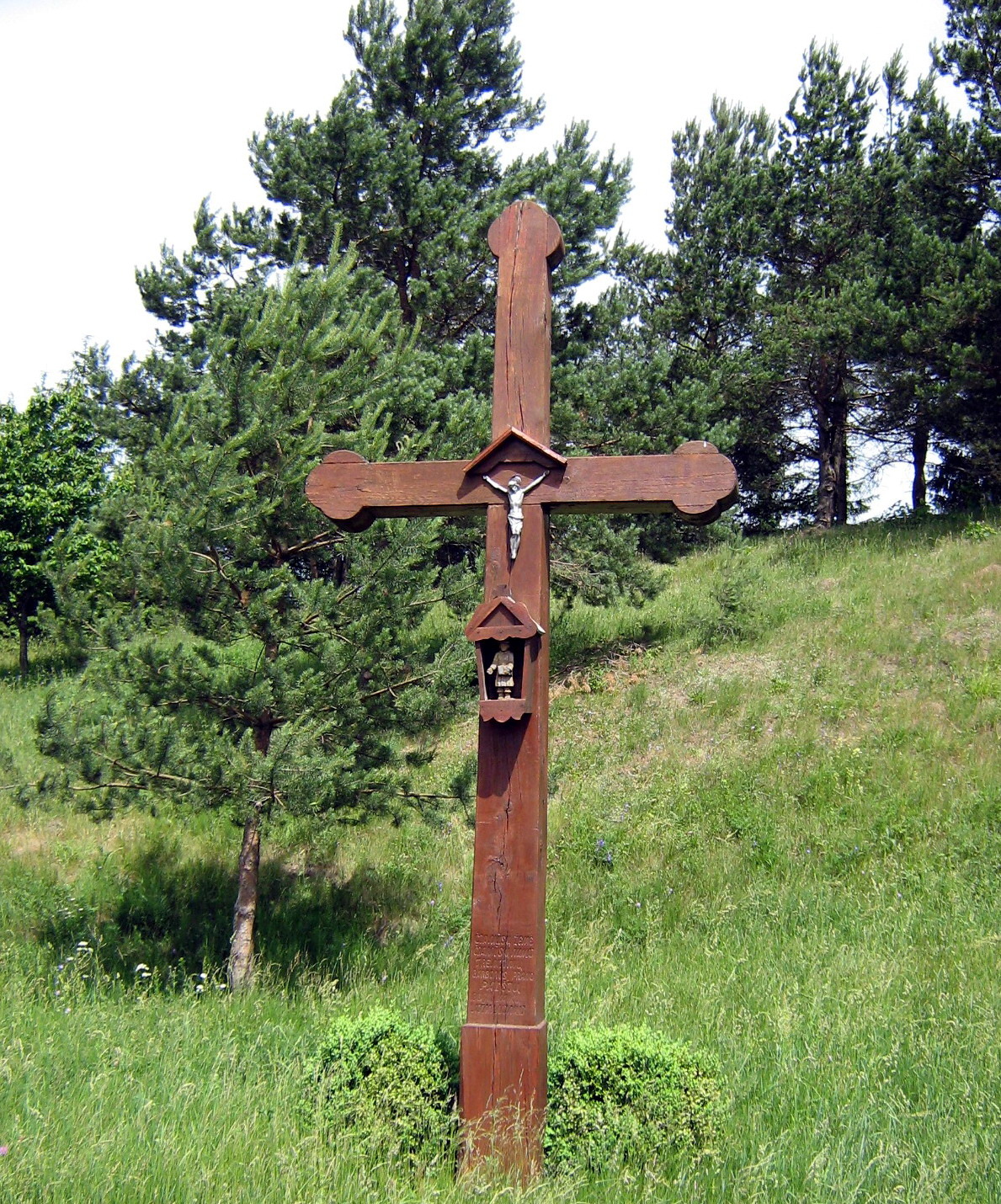 Kryžius Užpelkių piliakalnyje, Plungės rajonas, Žemaitijos nacionalinio parko teritorija Foto: Algirdas, 2007 m. birželio 15 d., Lietuva